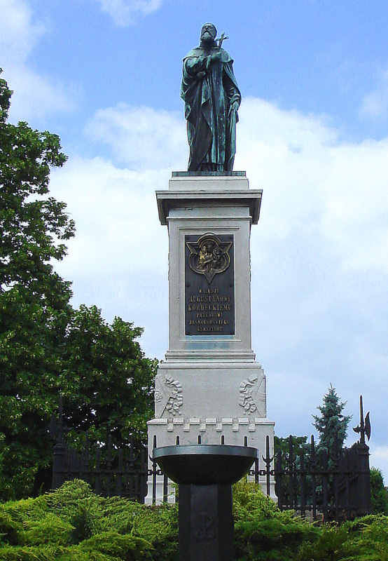 Częstochowa, zespół klasztorny paulinów na Jasnej Górze